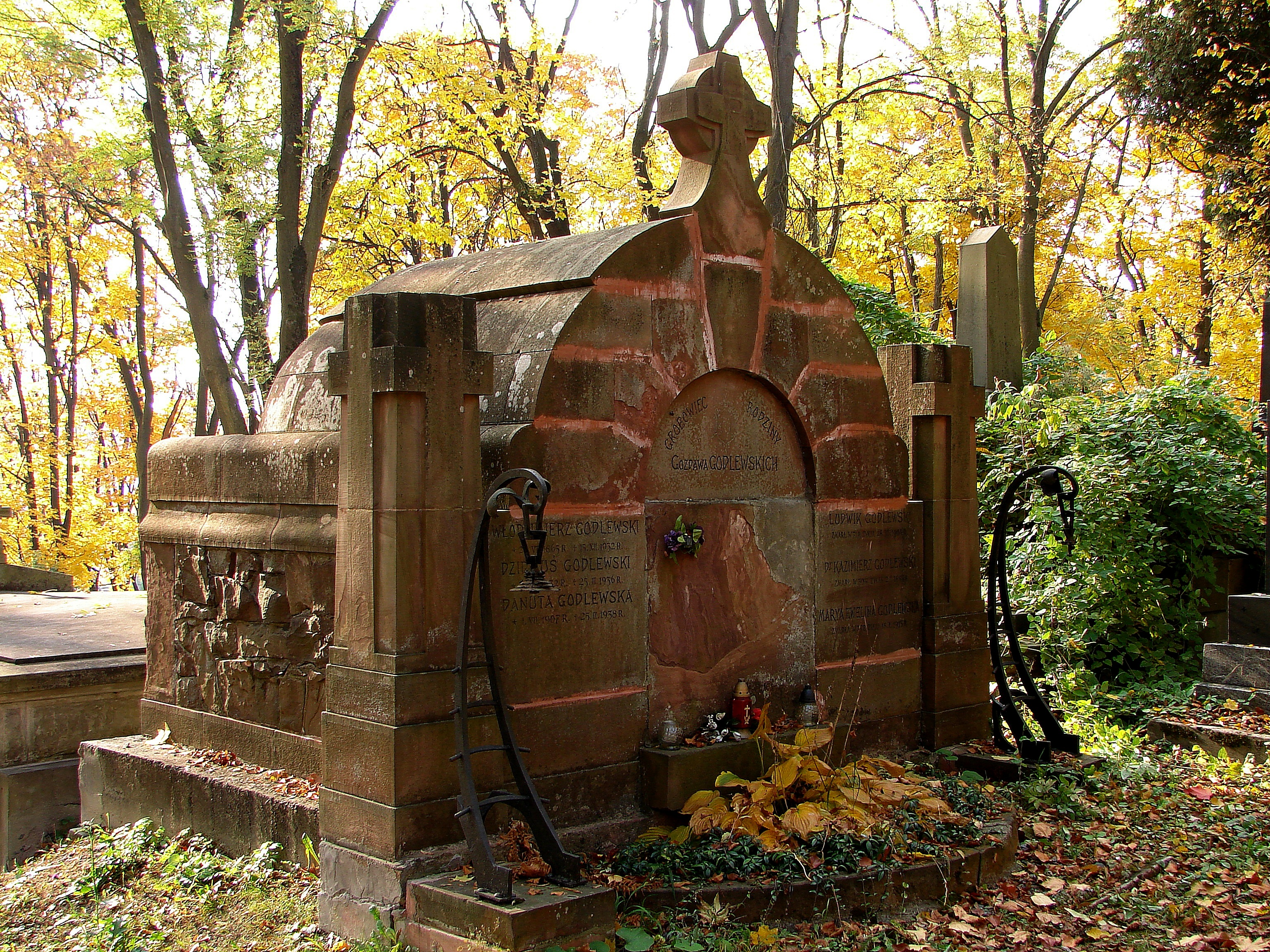 Родинний гробівець Гоздава Годлевських. Личаківськийцвинтар поле № 72.